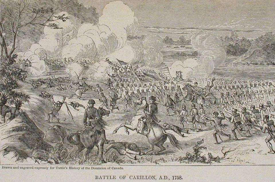 Représentation de la bataille de Fort Carillon donnée le 8 juillet 1758 en Amérique du Nord. Guerre de Sept ans en Europe, guerre de la Conquête en Amérique du Nord.